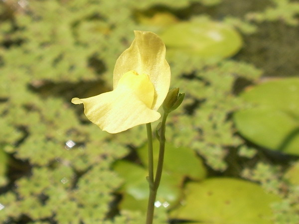 Utricularia aurea 's Flower